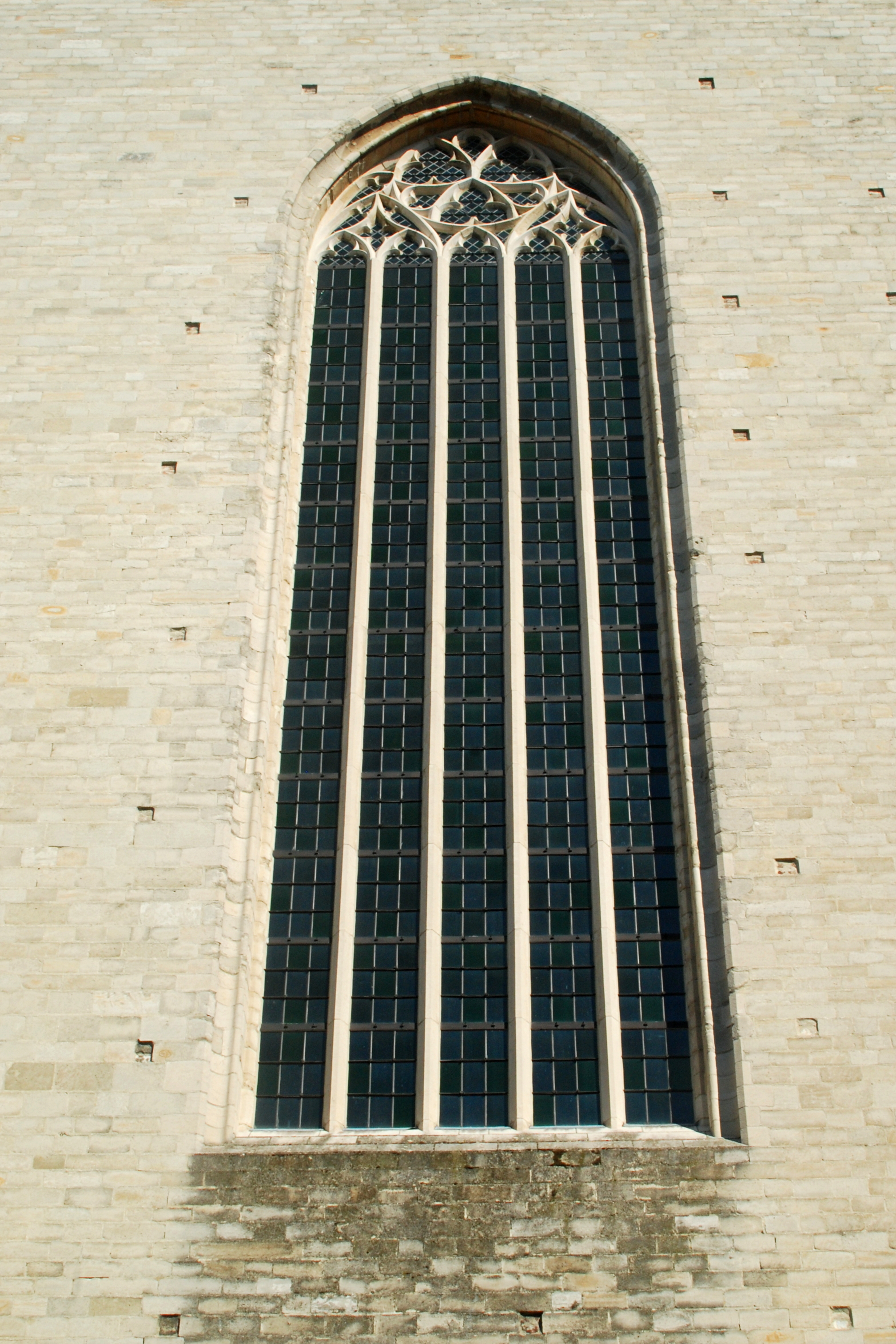 Belgique - Louvain - Église Saint-Jean-Baptiste-du-Béguinage - fenêtre de la façade